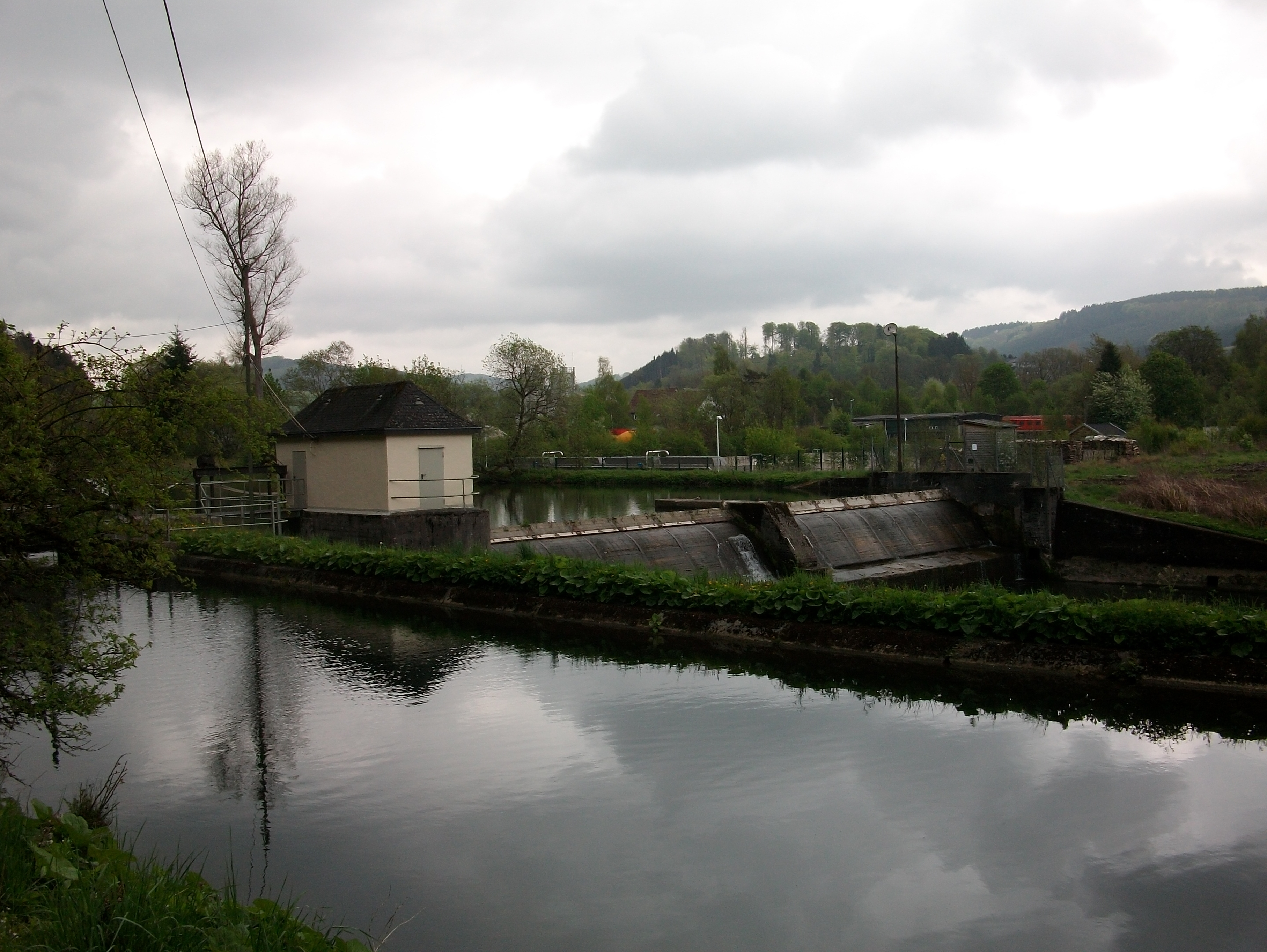 Bestwig-Alfert, Laufwasserkraftwerk an der Ruhr (Germany)